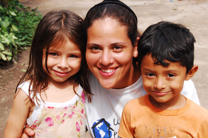 Una voluntaria de Un Techo para mi País El Salvador disfruta con niños de una comunidad a la que se ha beneficiado.